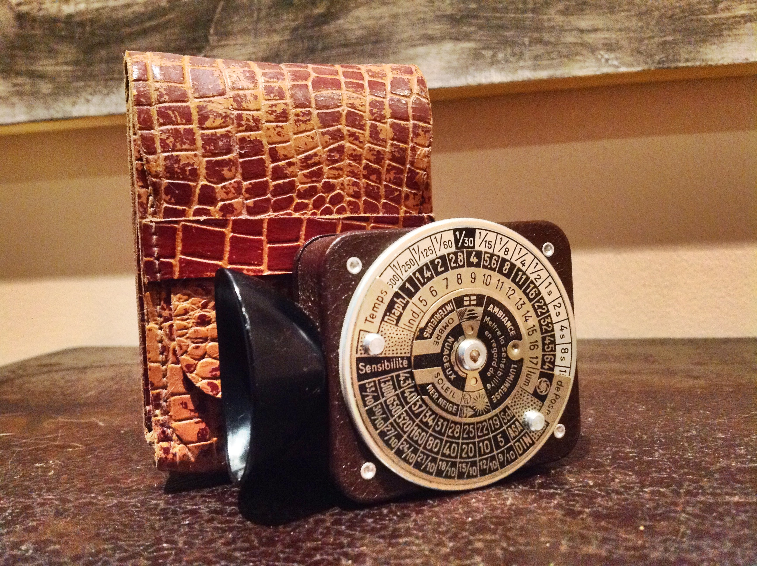 Posemétre, ÉTOILE Optique